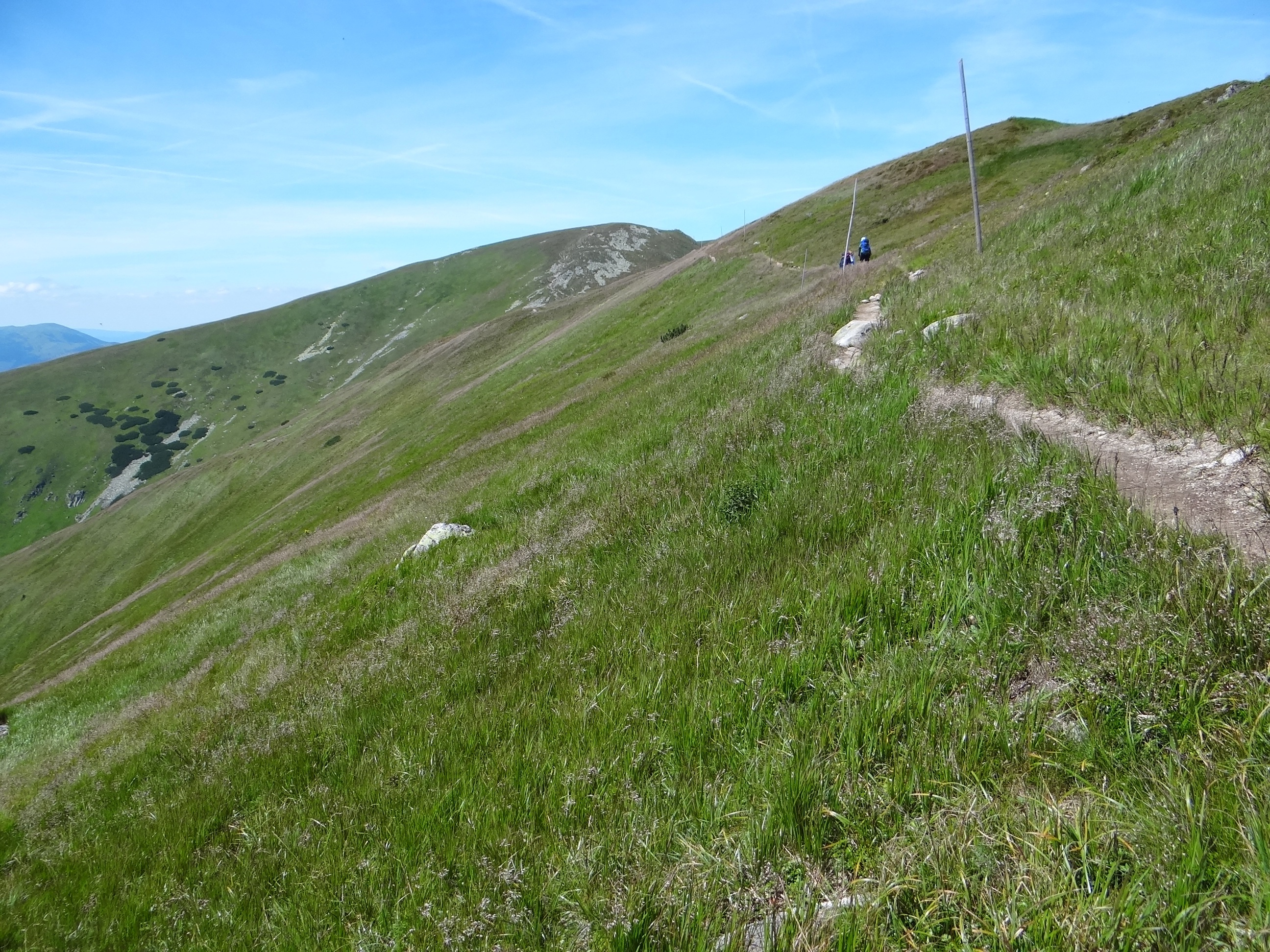 Chabenec. View from Kotliska